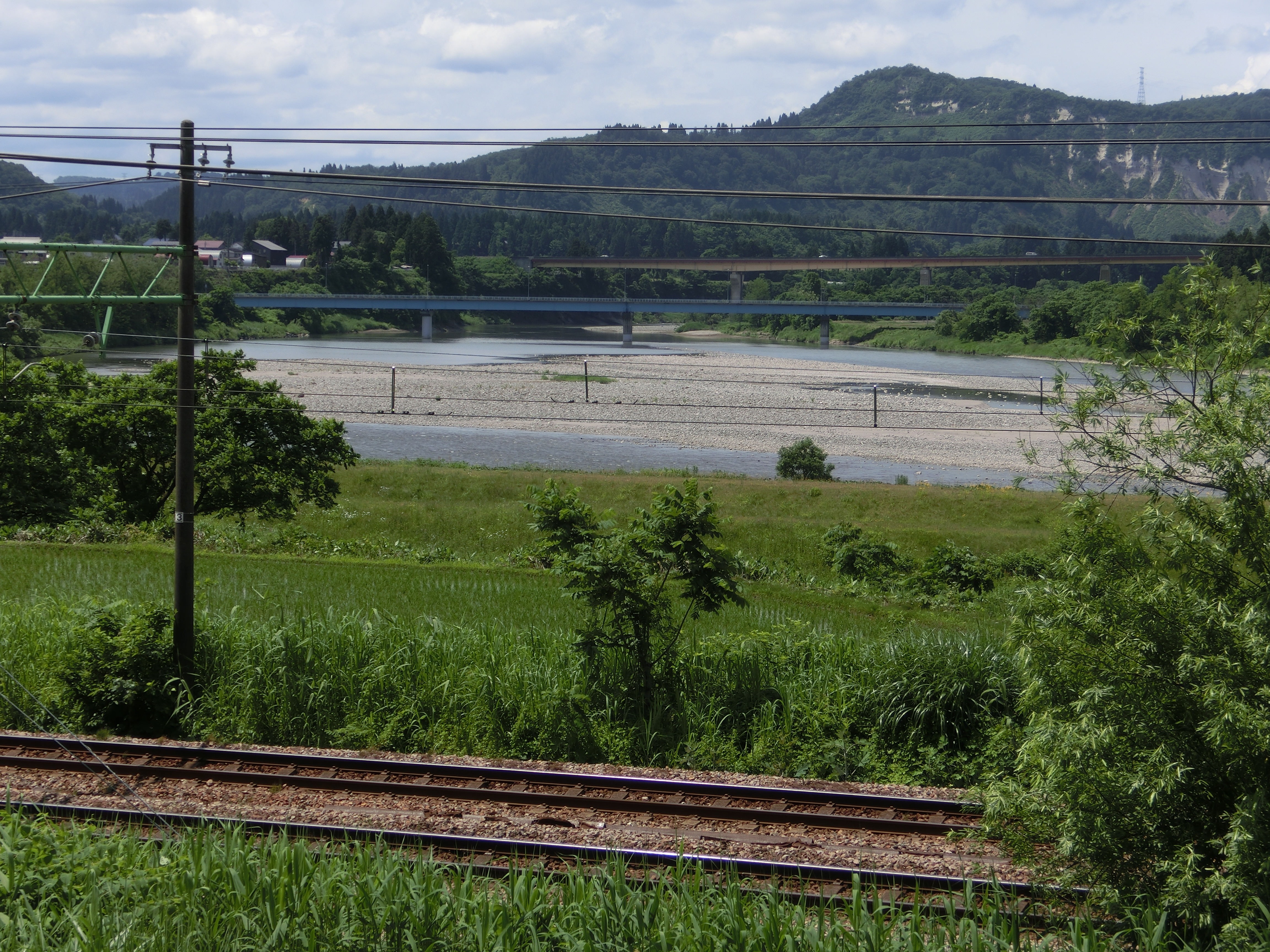 投稿者によって新潟県長岡市東川口（信濃川東岸、魚野川との合流点付近）より西倉橋及び川口橋(関越自動車道)を撮影。手前に見える線路は上越線。背景に見える中央の山は高場山。